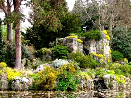 Flora (Köln): Der von H.H. Essen 1914 geplante Botanische Garten zeigt an seiner Nordseite ein Alpinum hinter einem Seerosenteich. Der Künstliche Felsen ist Pflanzgrund für Alpine Gewächse. Aufnahme im April zeigt zahlreiche blühende Bodendecker.